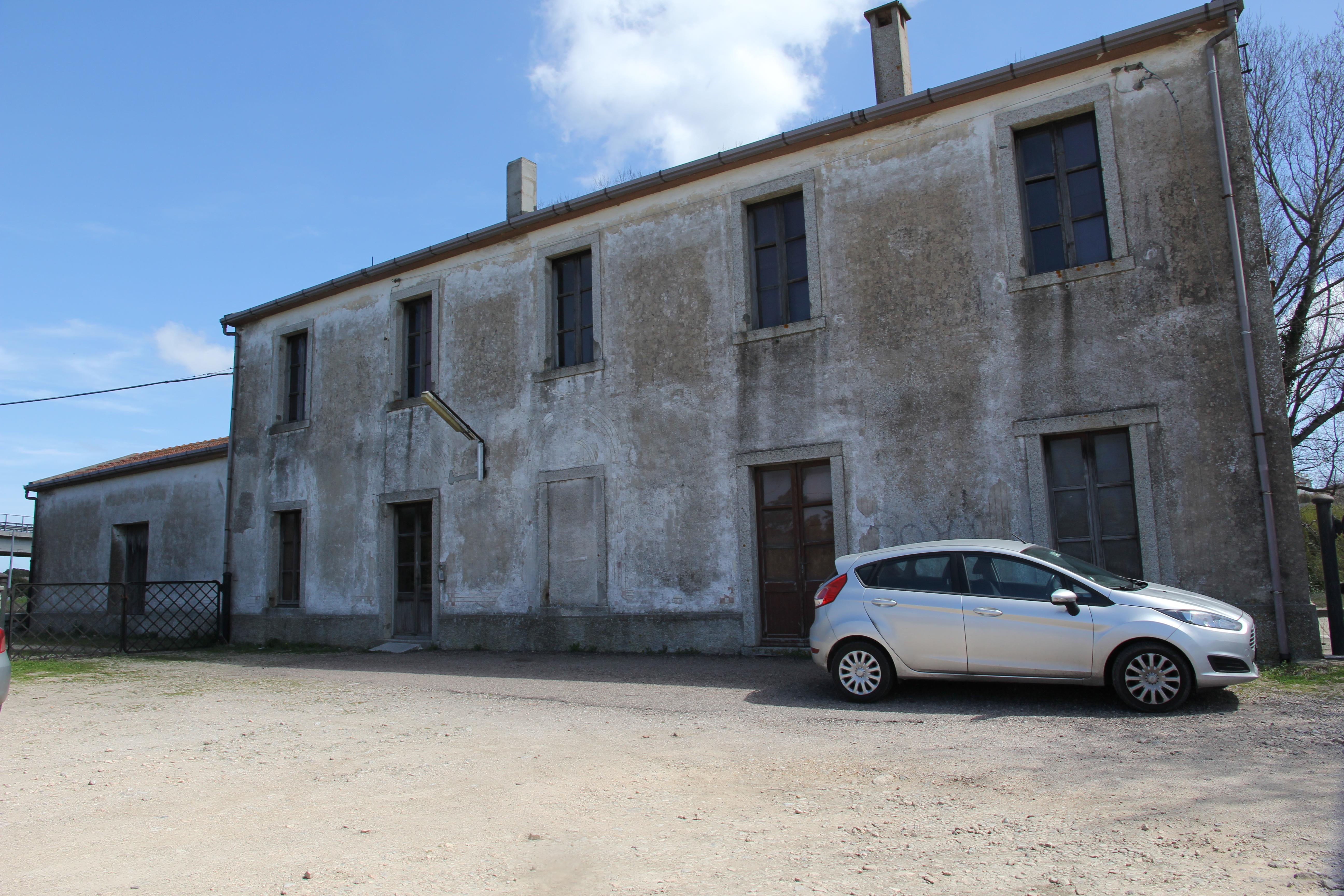 Ferrovia Sassari-Tempio-Palau. Stazione ferroviaria di Luras (comune di Calangianus).